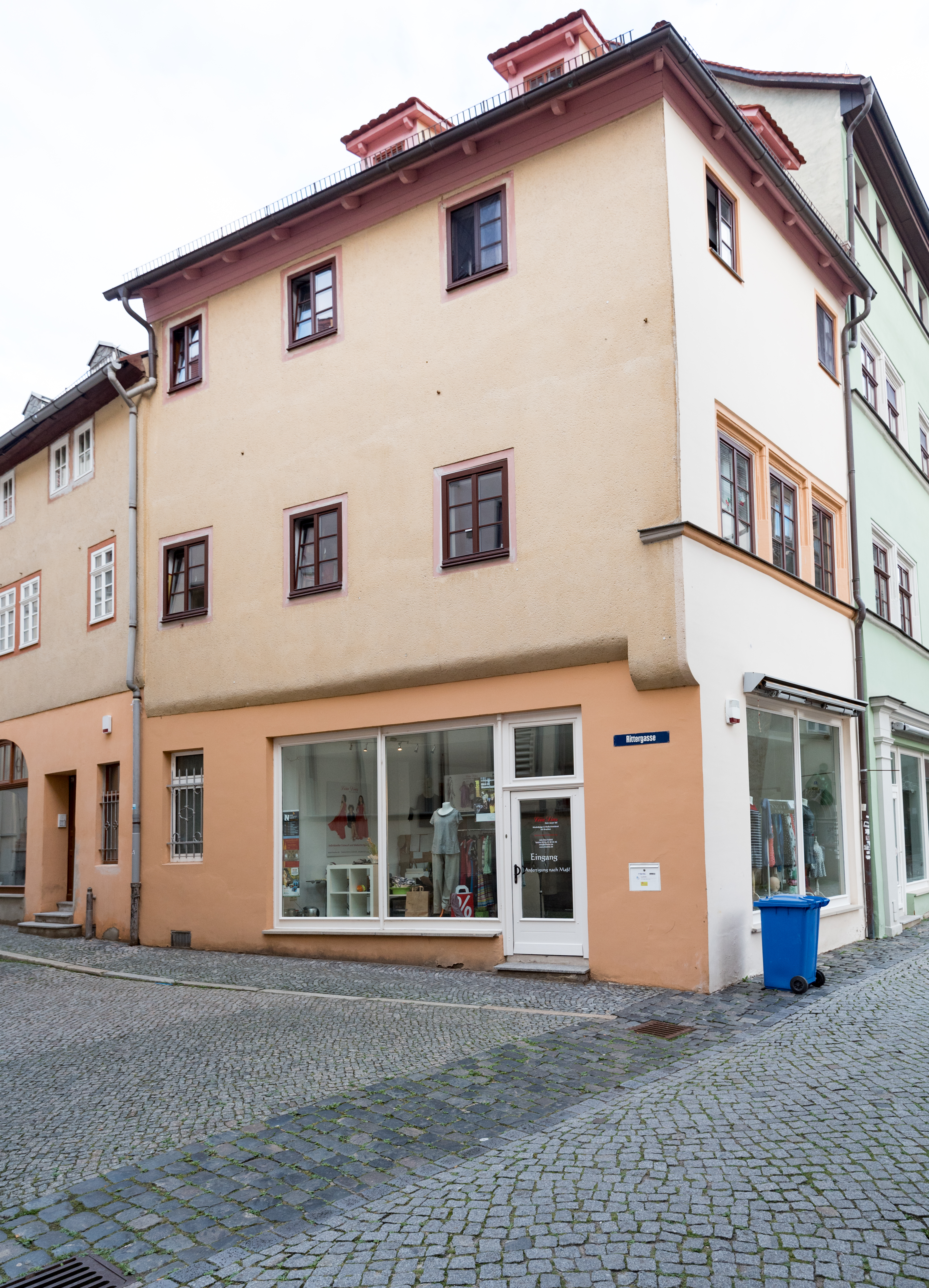 Naumburg (Saale), Engelgasse 7